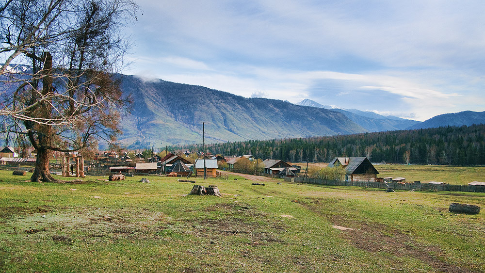 пос. Кучерла, Усть-Коксинский район Республики Алтай